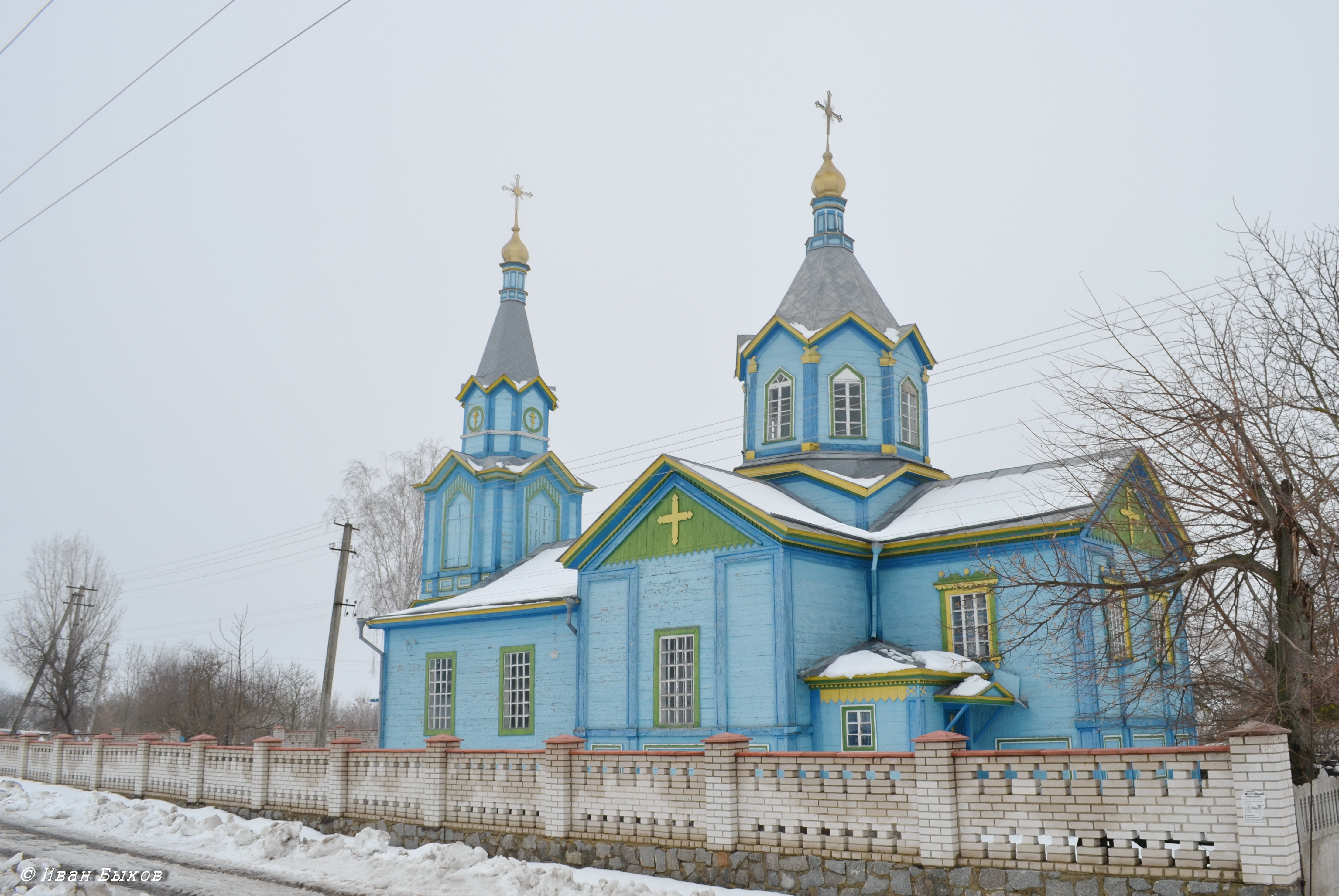 Церква Різдва Богородиці (дер.), село Тростинка